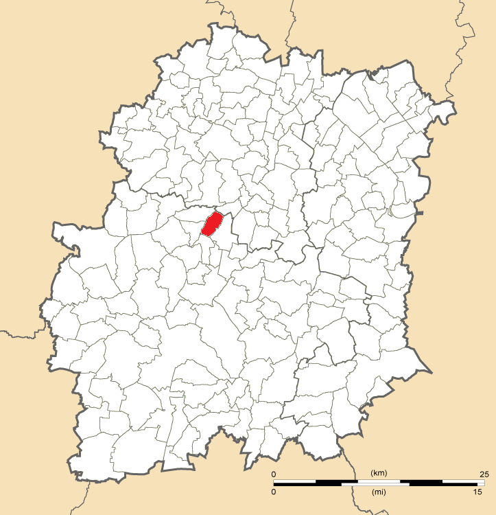 Carte de position de Saint-Yon en Essonne (91)